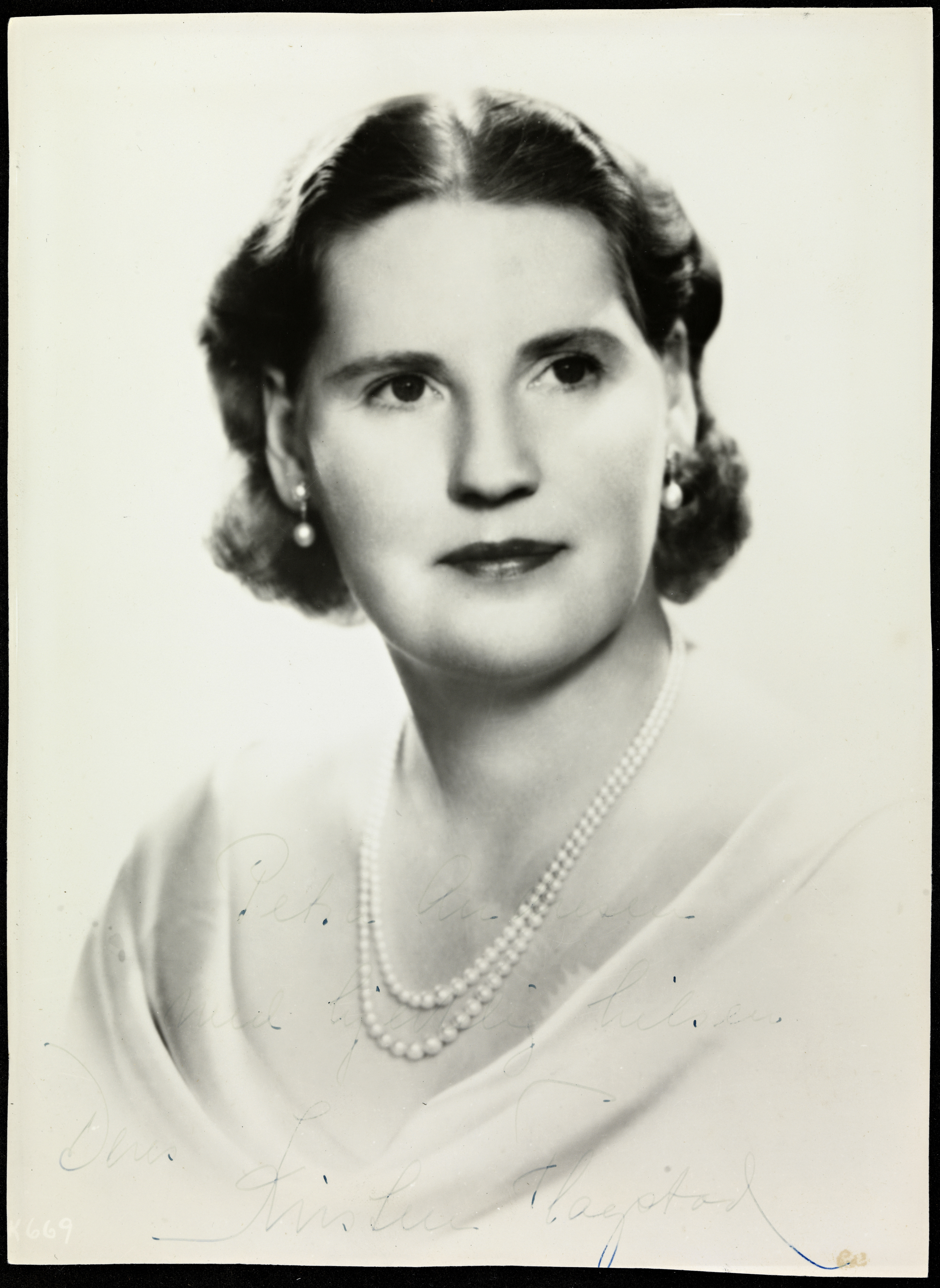 Tittel / Title: Portrett av Kirsten Flagstad (1895-1962) Beskrivelse / Description: Bildet har en delvis uleselig dedikasjon på forsiden. Dato / Date: ca 1940-45 Fotograf / Photographer: ukjent / unknown Eier / Owner Institution: Nasjonalbiblioteket / National Library of Norway Lenke / Link: Bildesignatur / Image Number: blds_05688_a